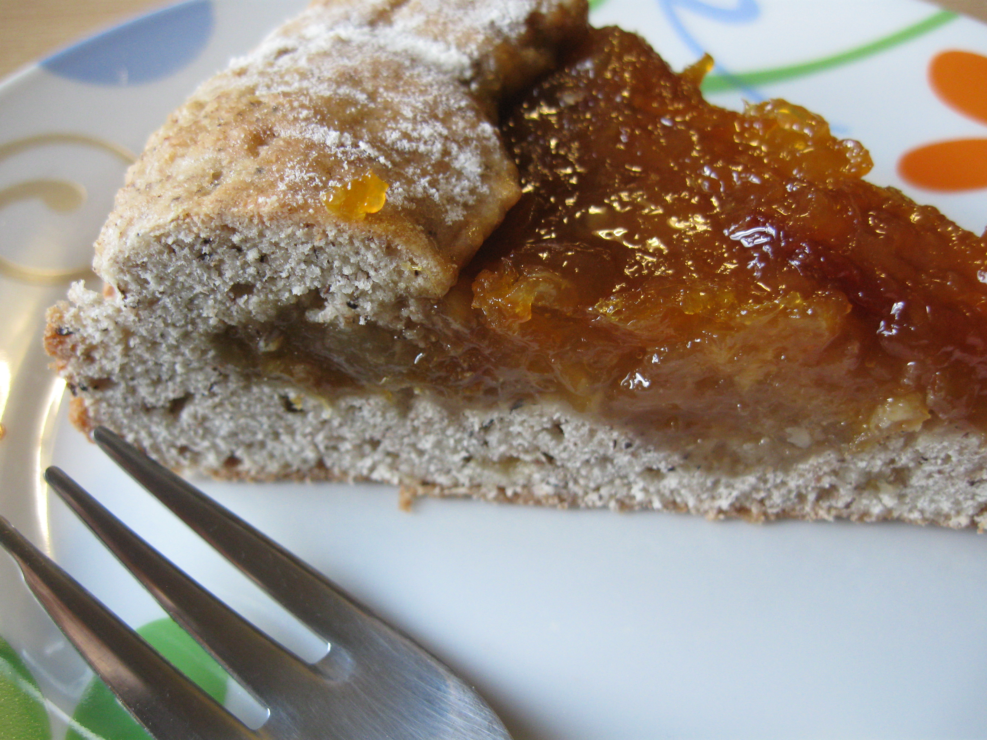 Crostata con farina di grano saraceno con marmellata di arance